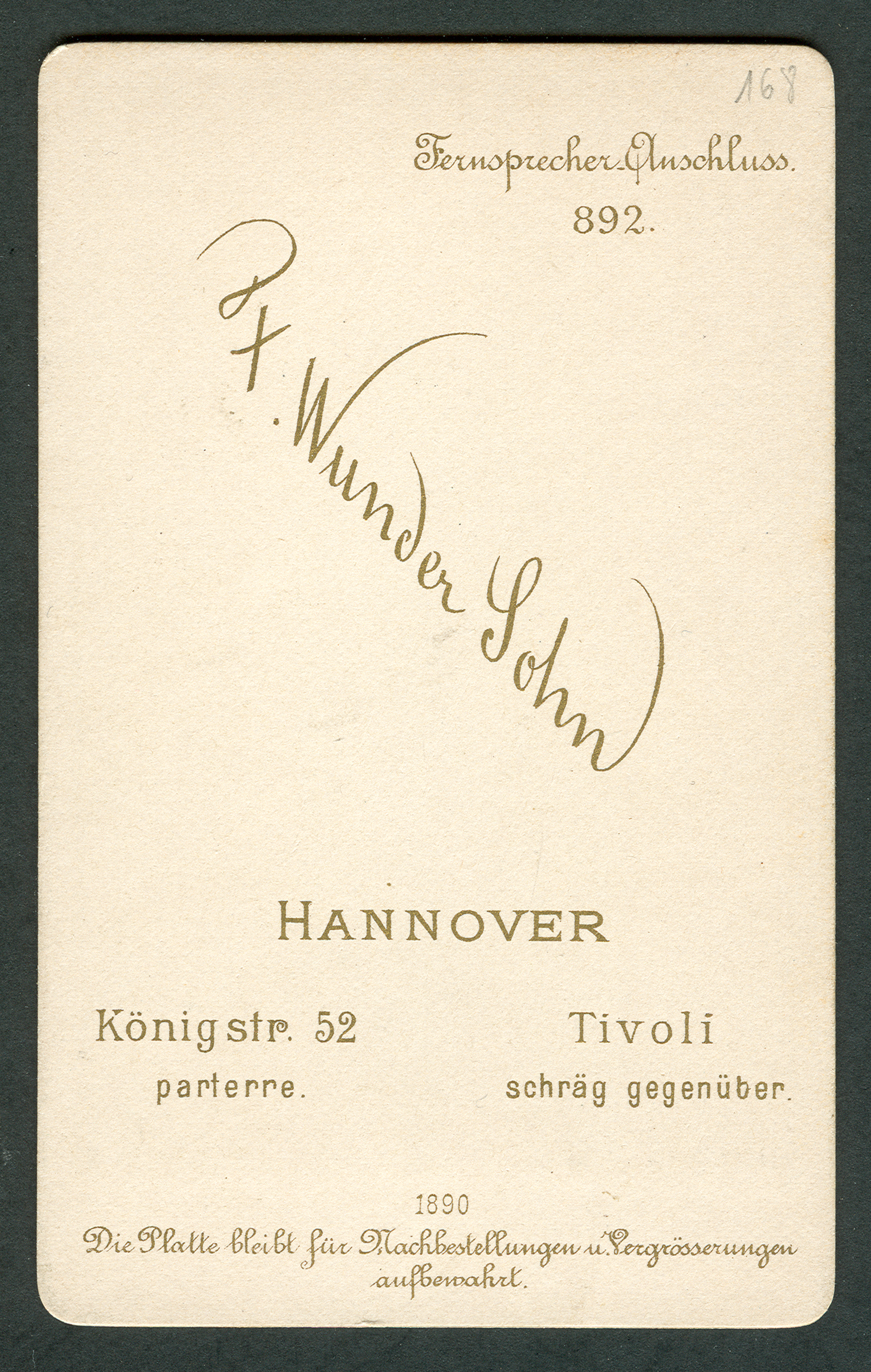 Ergänzend zu dem Nachweis über einen der ersten Telefon-Anschlüsse der Familie Wunder in Hannover (Ludwig Hoerner: 'Friedrich Karl Wunder (1815–1893). Hannovers erster Photograph. In: Hannoversche Geschichtsblätter. Neue Folge, Band 39, 1985, S. 261–295) dokumentiert die Rückseite dieser Carte de Visite, daß Otto neben seinem Bruder Karl F. Wunder den Vater - unter dessem berühmten Namen er ein eigenes Ateliers betrieb - ebenfalls noch mit einem der frühesten Telefonanschlüsse in Hannover erfreuen konnte. Gegenüber älteren Visitenkarten warb Otto Wunder hier nun nicht mehr mit Abbildungen seiner Medaillen und Auszeichnungen, sondern zeichnete - in goldener Schrift - lediglich noch mit seinem guten (und offensichtlich "selbstsprechendem" Firmen-)Namen.